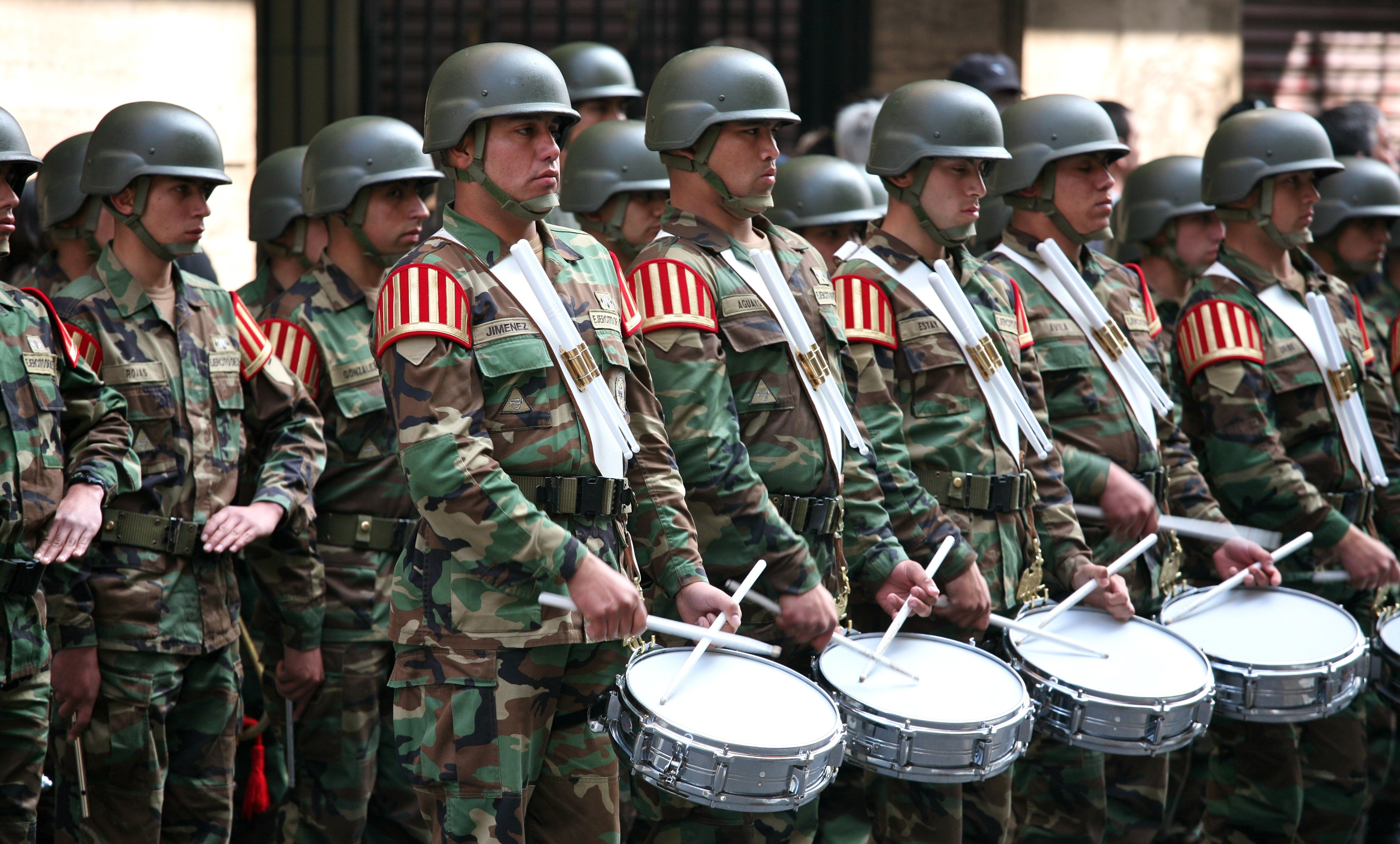 Banda del Ejército de Chile